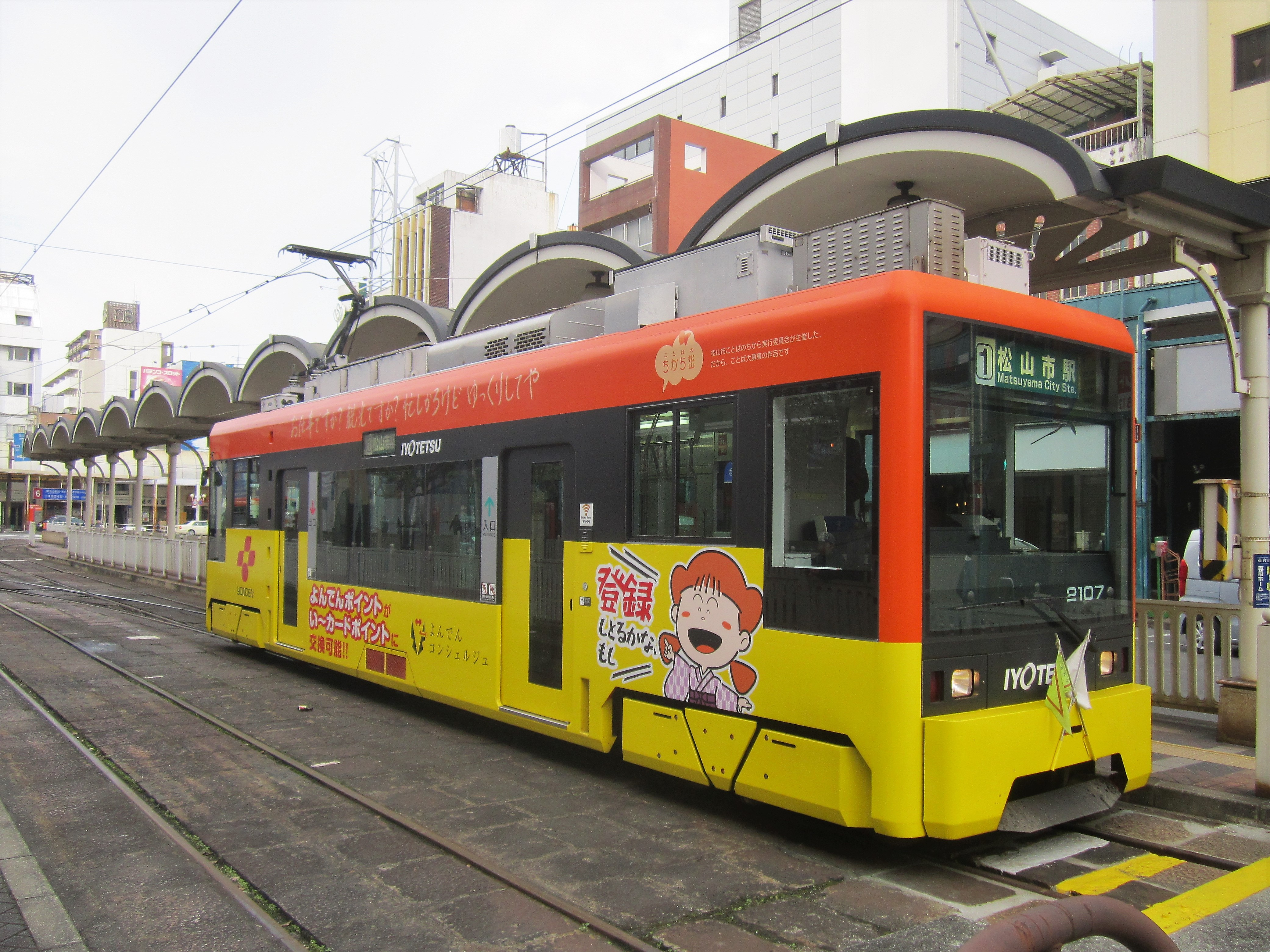 松山市駅前駅に停車中の伊予鉄道モハ2107